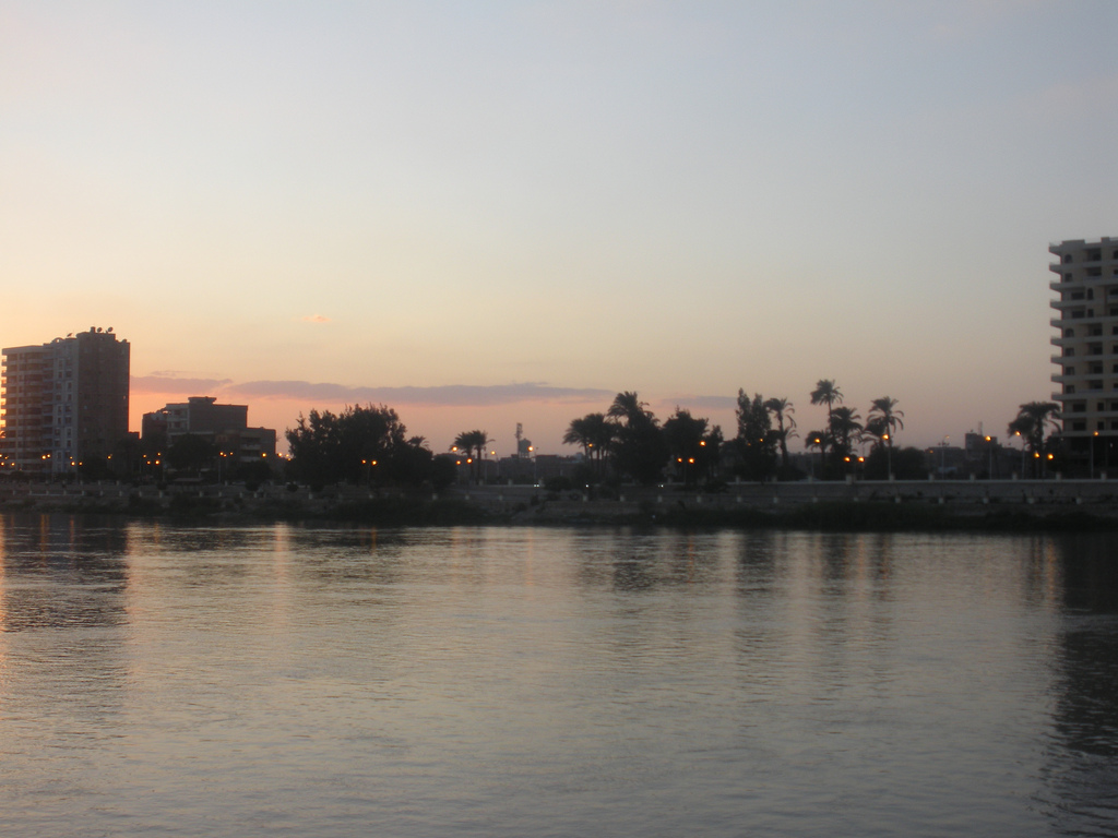 beni suef